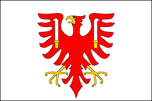 vlajka, Týn nad Bečvou, okres Přerov